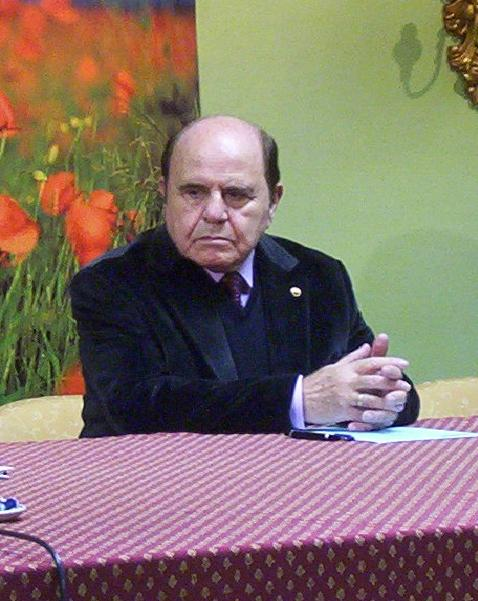 Luis López Álvarez, escritor español. Parte de foto cortada de una tomada en Valladolid, en la entrega del Premio Castellano de pro 2007.